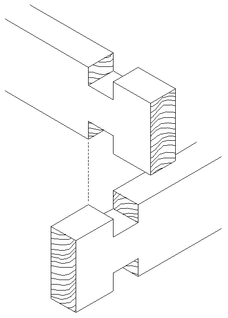 Веза на ћерт.